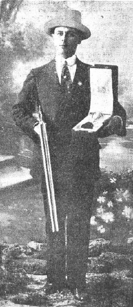 Fotografía del matador de toros español Relampaguito publicada en 1914 con motivo de haber ganado un campeonato de tiro de pichón celebrado en Almería